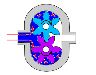 popis pracovních fází zubového čerpadla - fáze 2.